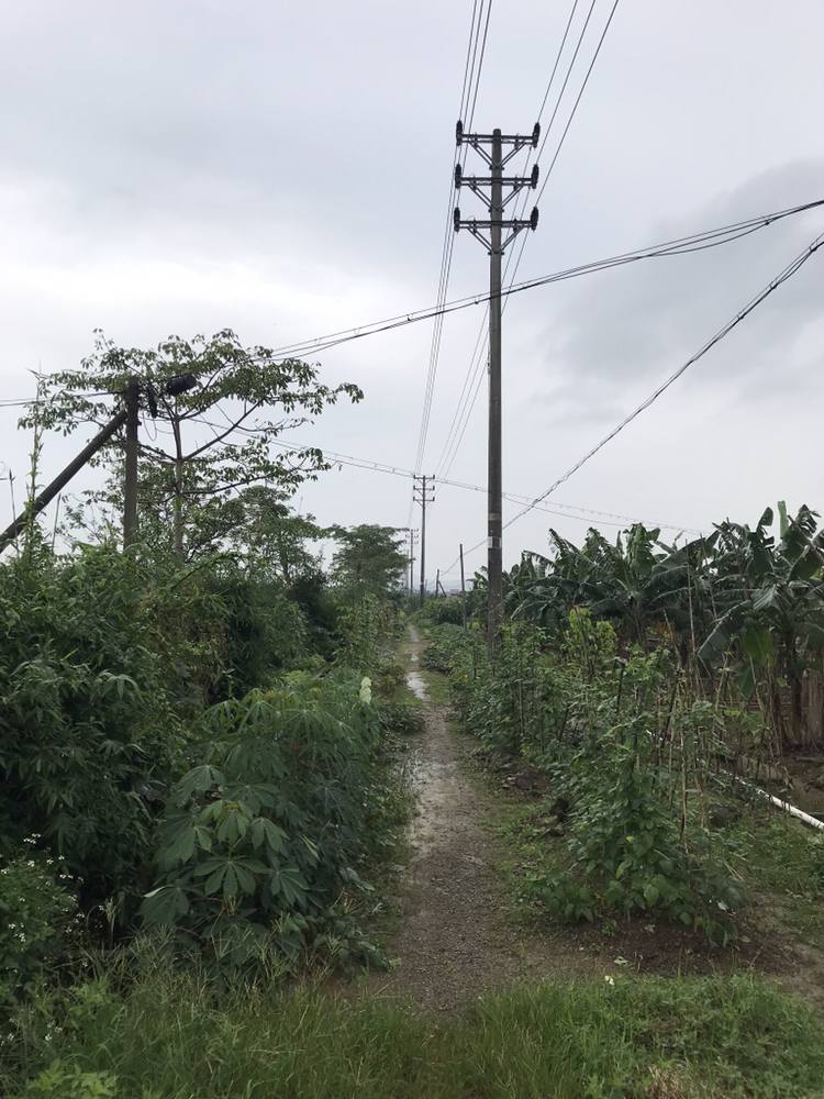 中文（香港）: 位於新會大澤鎮牛簕鄉新開公路北側的新寧鐵路路基遺跡